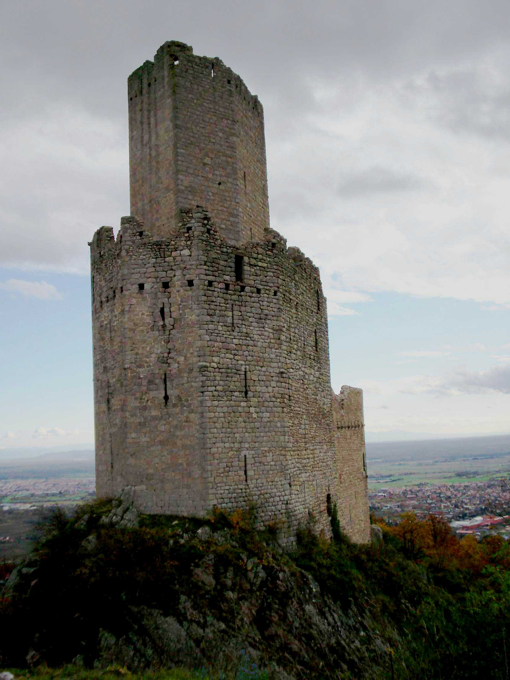 Ortenbourg